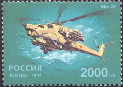 Почтовая марка России